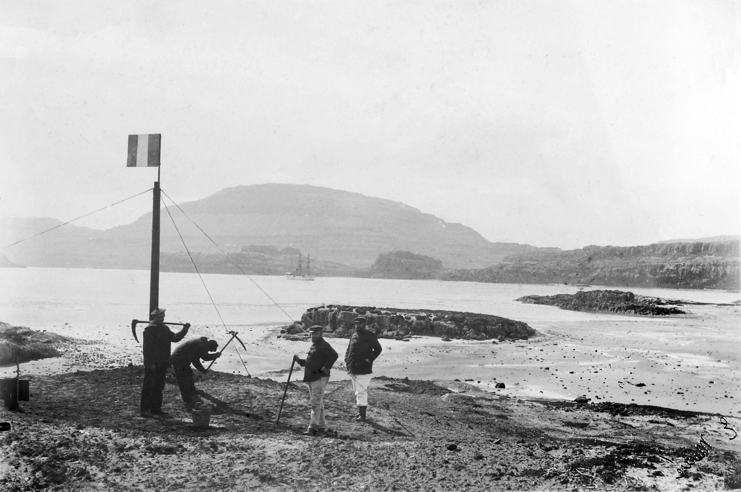 Port-Gazelle (île Kerguelen) le 8 janvier 1893. Levée des couleurs par l'équipage de l'aviso-transport française l'Eure commandée par le capitaine de frégate Lieutard lors du renouvellement de la prise de possession solennelle de l'archipel par la France.